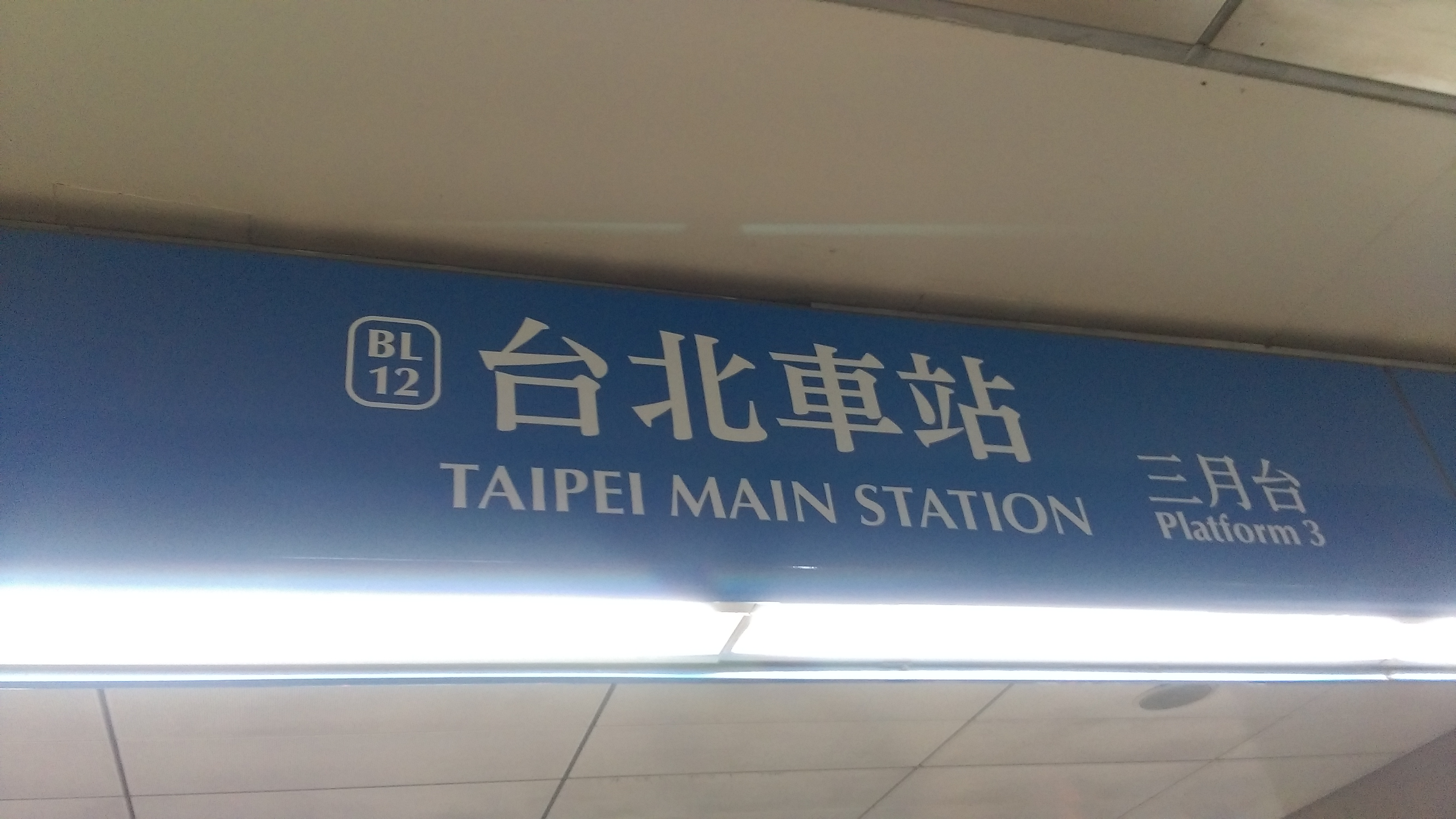 捷運臺北車站板南線第三月台標示BL12新編號。